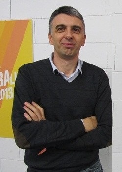 Драган Ђукић, рукометни тренер